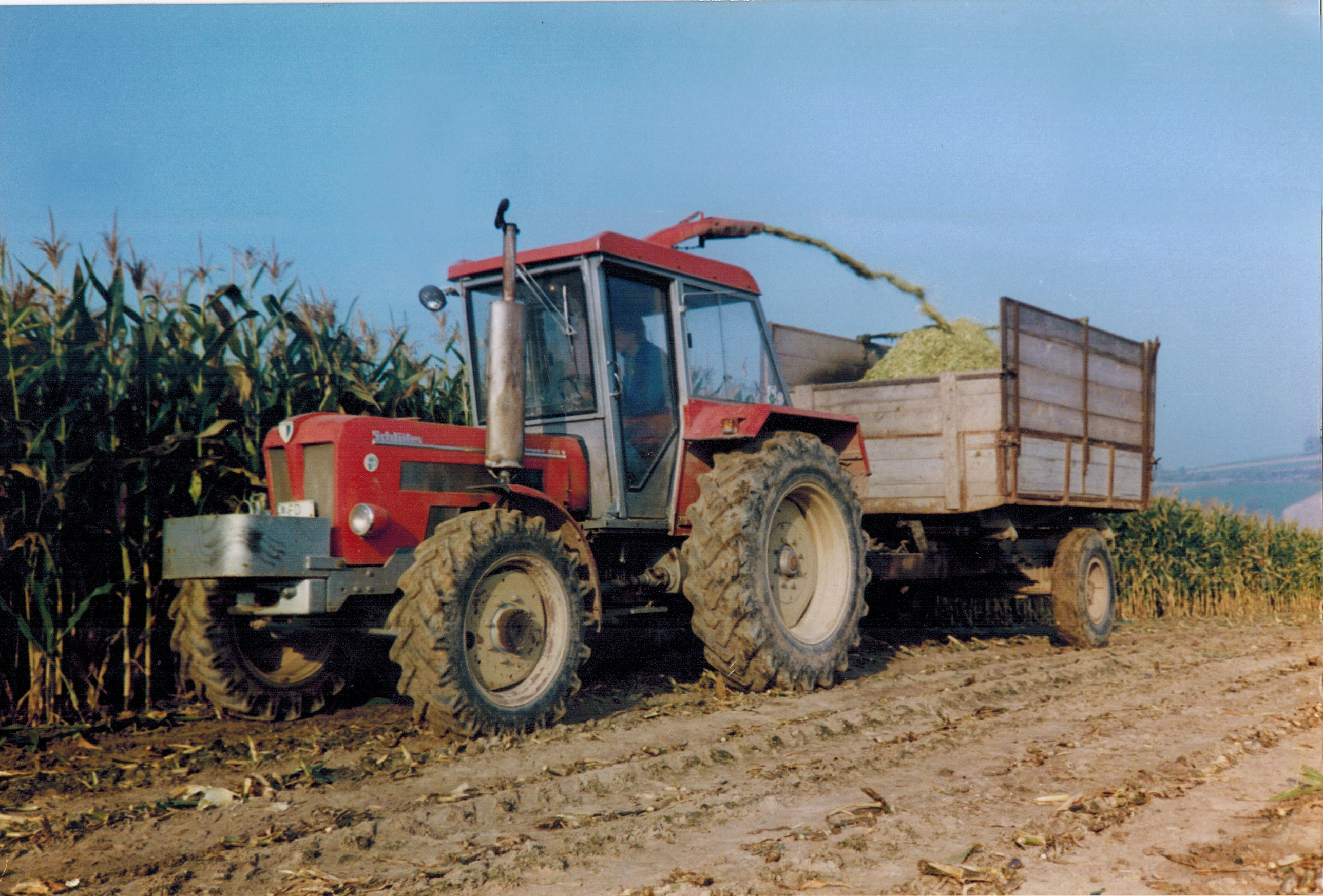 Schlüter Compact 850 bei der Maisernte 1986 (Typ SF4800V/802)